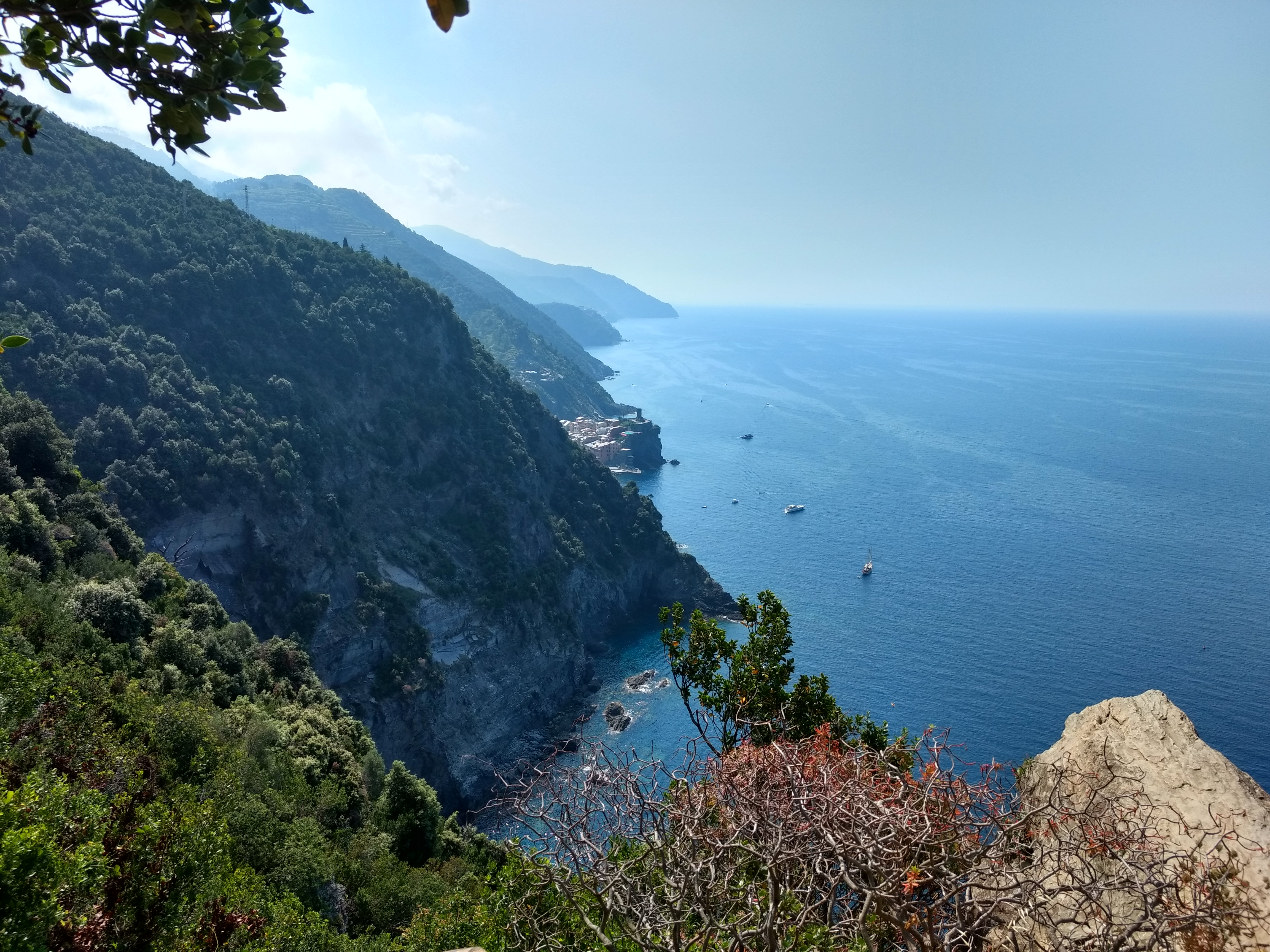 Trail between Monterosso and Vernezza